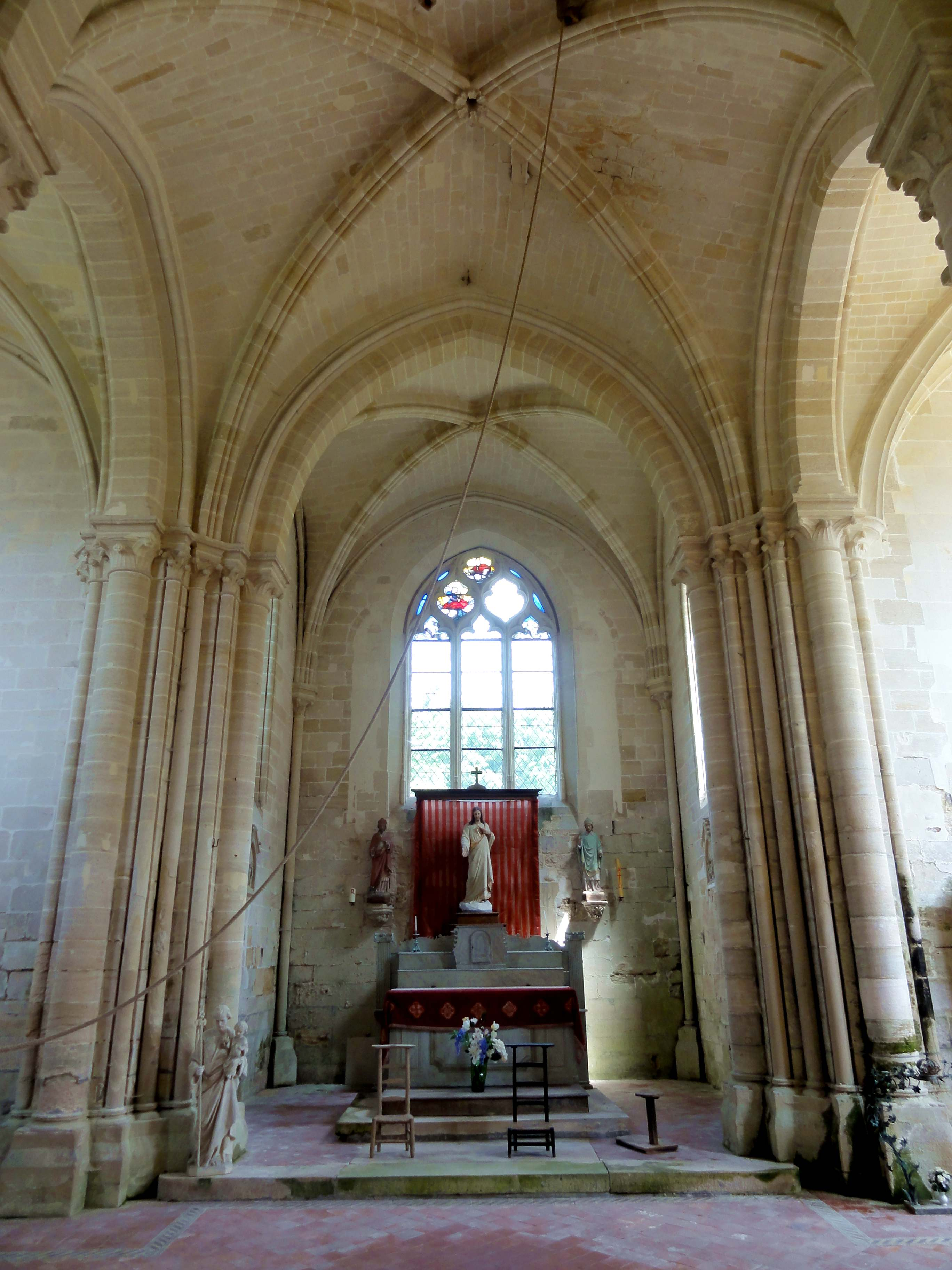 Intérieur de l'église Saint-Lucien d'Ansacq (voir titre).